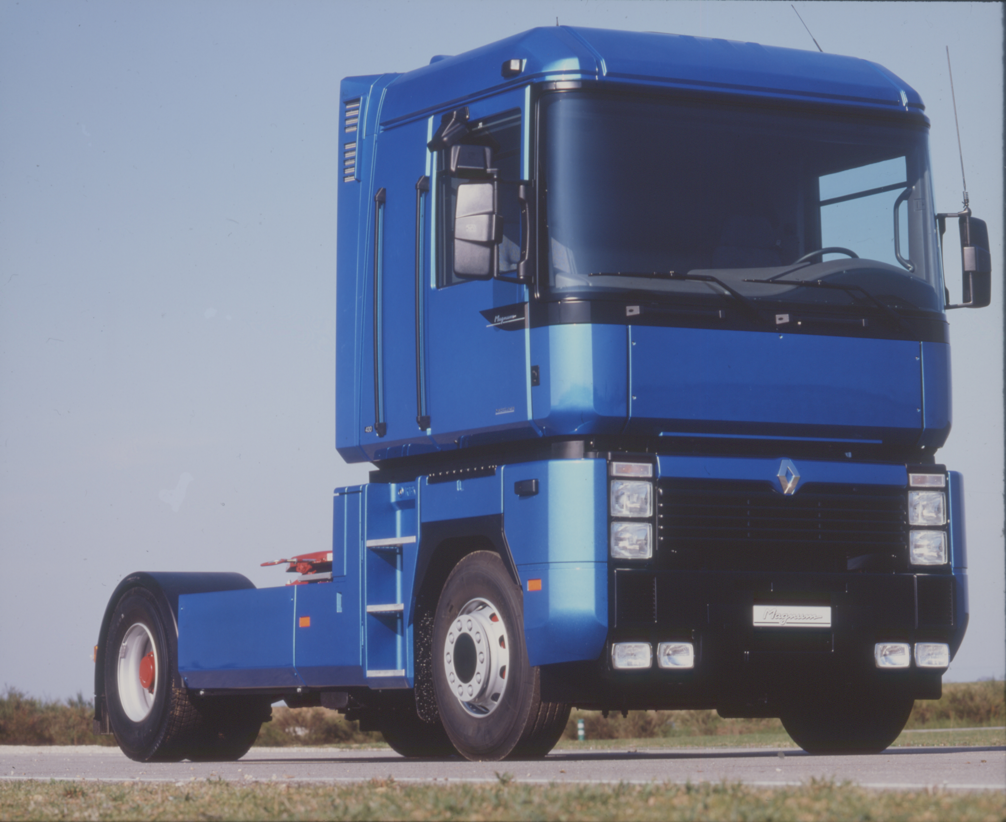 «РЕНО» СЕРИИ «АЕ МАГНУМ»